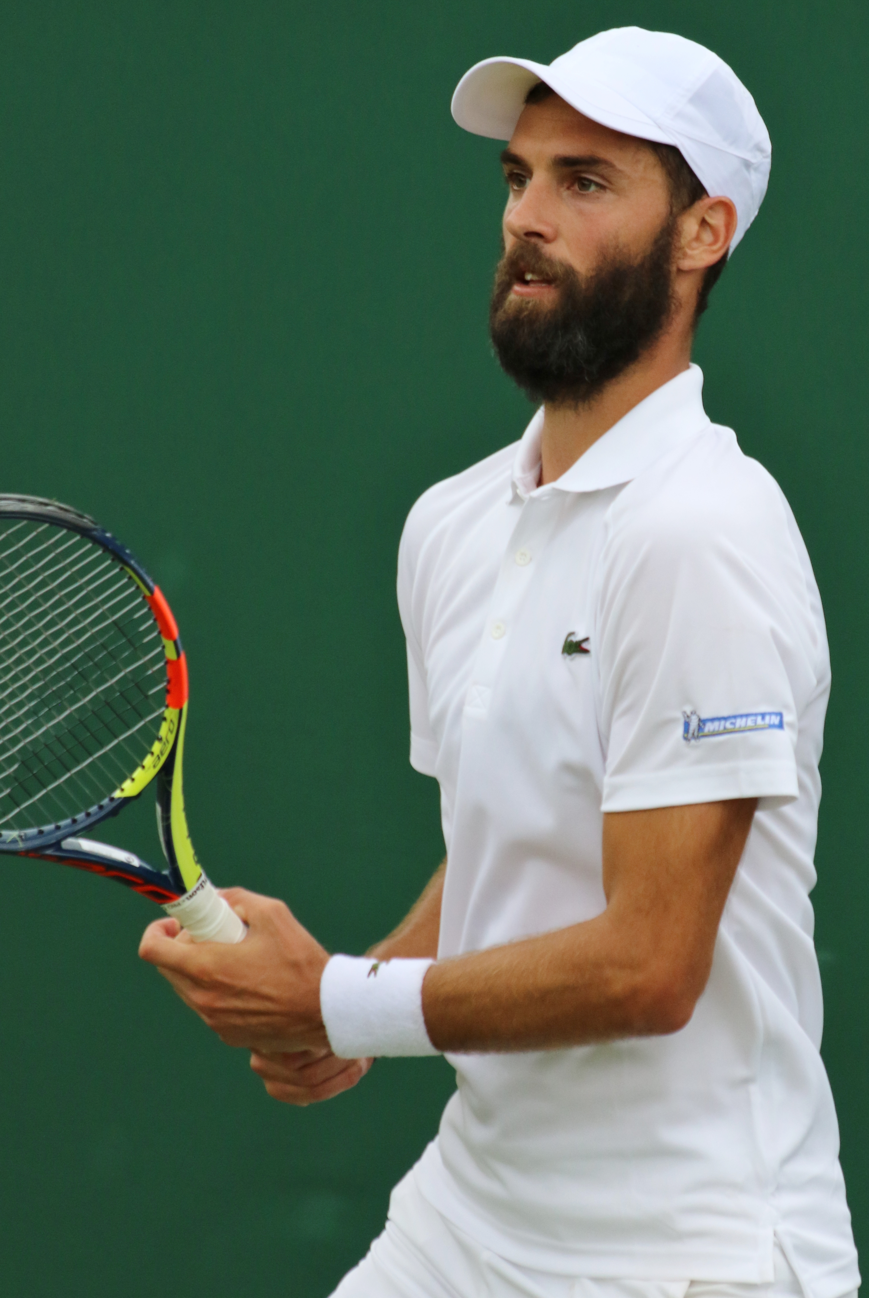 Paire WM17 (1)